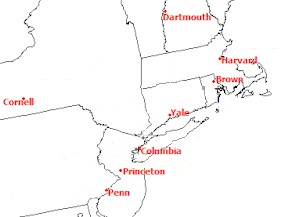 Modifs persos (zoom) de la carte de localisation des universités membres de l'Ivy League (sports universitaires, USA).